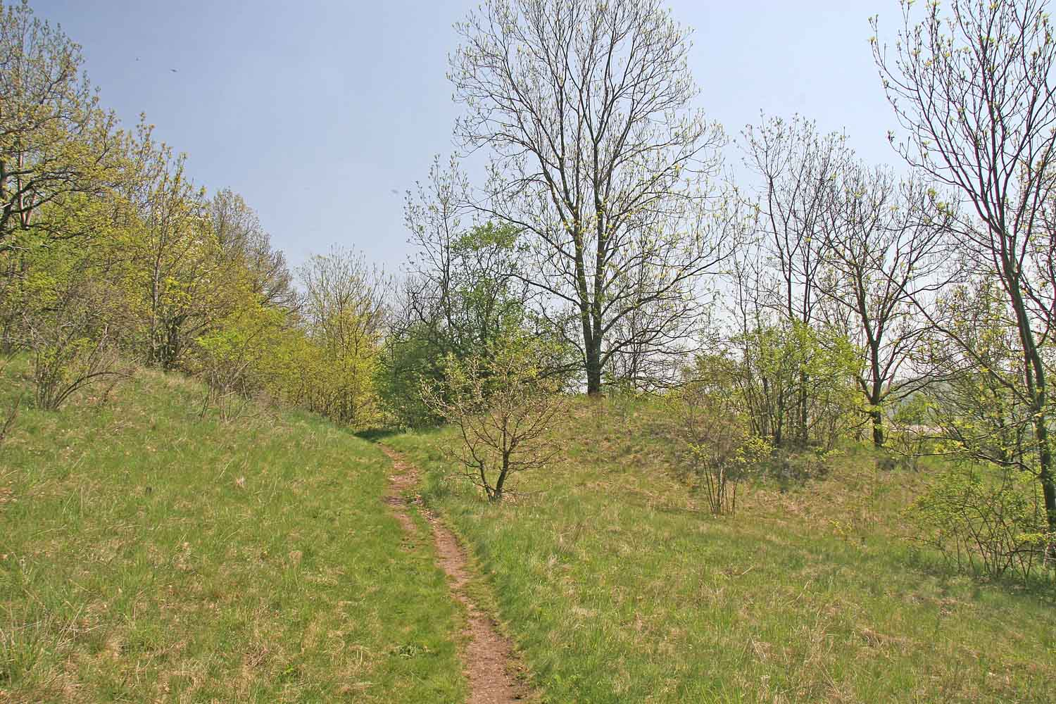 Pozůstatky valů hradiště na Kotýzu